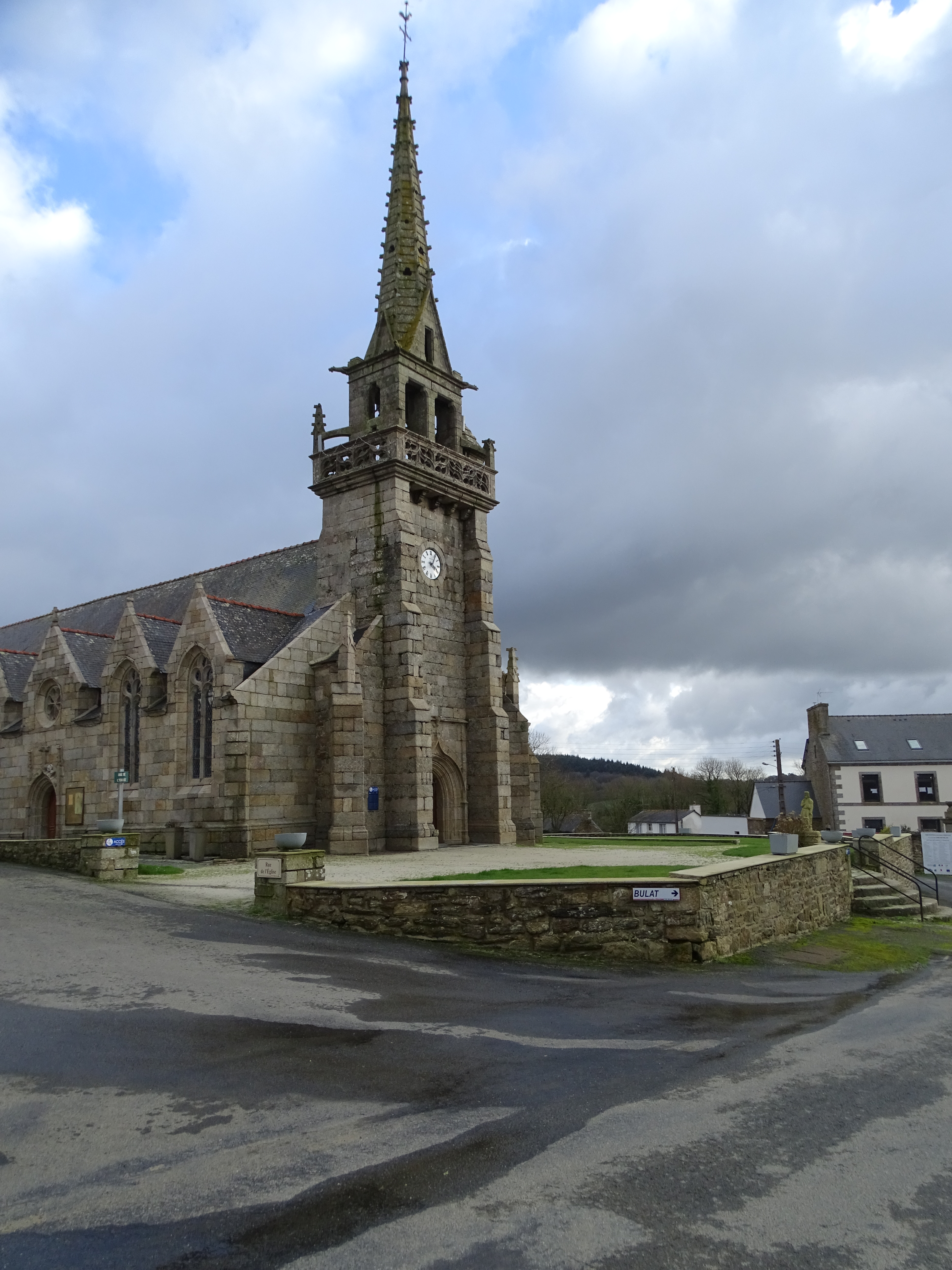 Pont-Melvez. Iliz. Tour